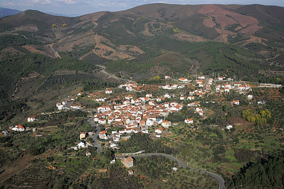 Vista aérea de Lavacolhos